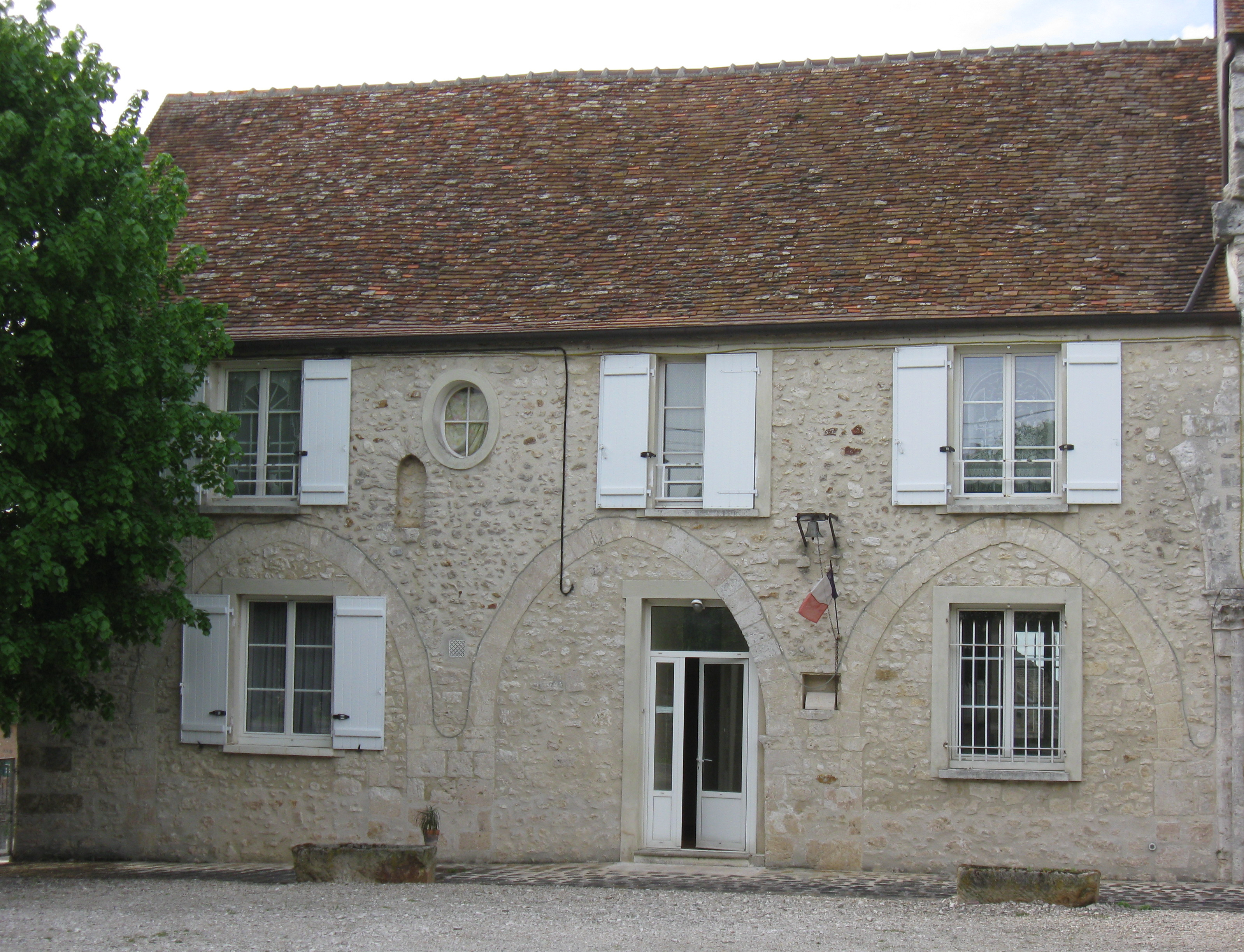 Mairie de Vulaines-lès-Provins. (département de la Seine et Marne, région Île-de-France).